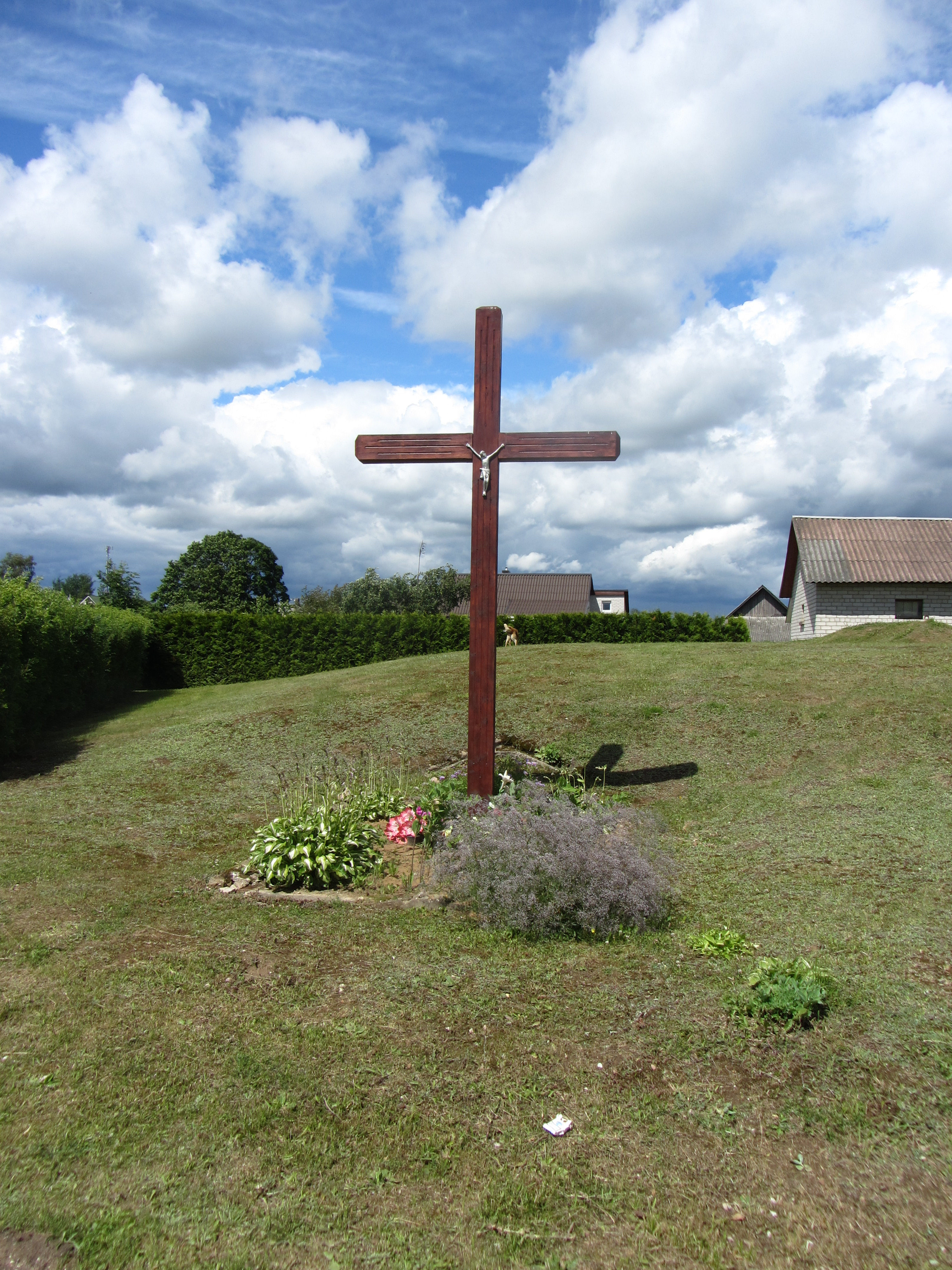 Lazdėnai 21400, Lithuania